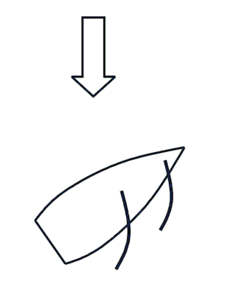 skemo pri vento, por aldoni propran priskribon